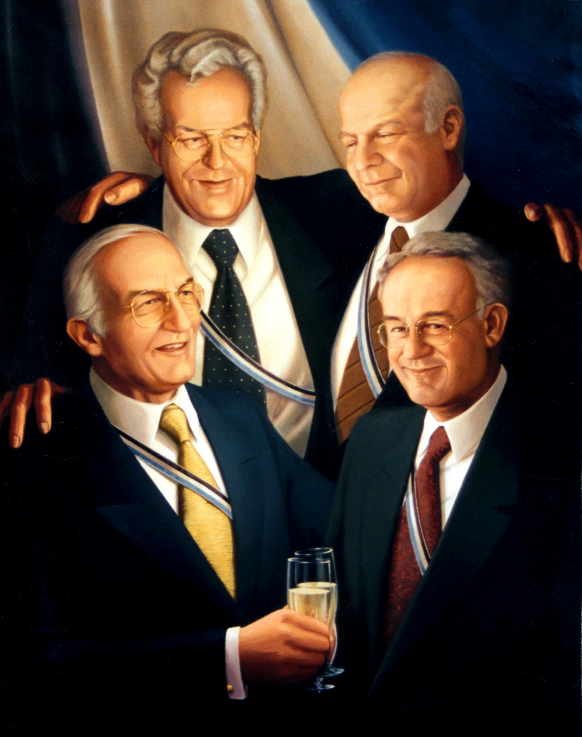 Ölgemälde der vier Münchner Schwaben, die 1998 als Jagdfreunde bei einem Flugzeugabsturz in Tansania ums Leben kamen: Prof. Dr. med. Siegfried v. Bary, Dr. iur. Norbert Streng, Klaus Voigt und Prof. Dr. med. Wolfgang Küßwetter.